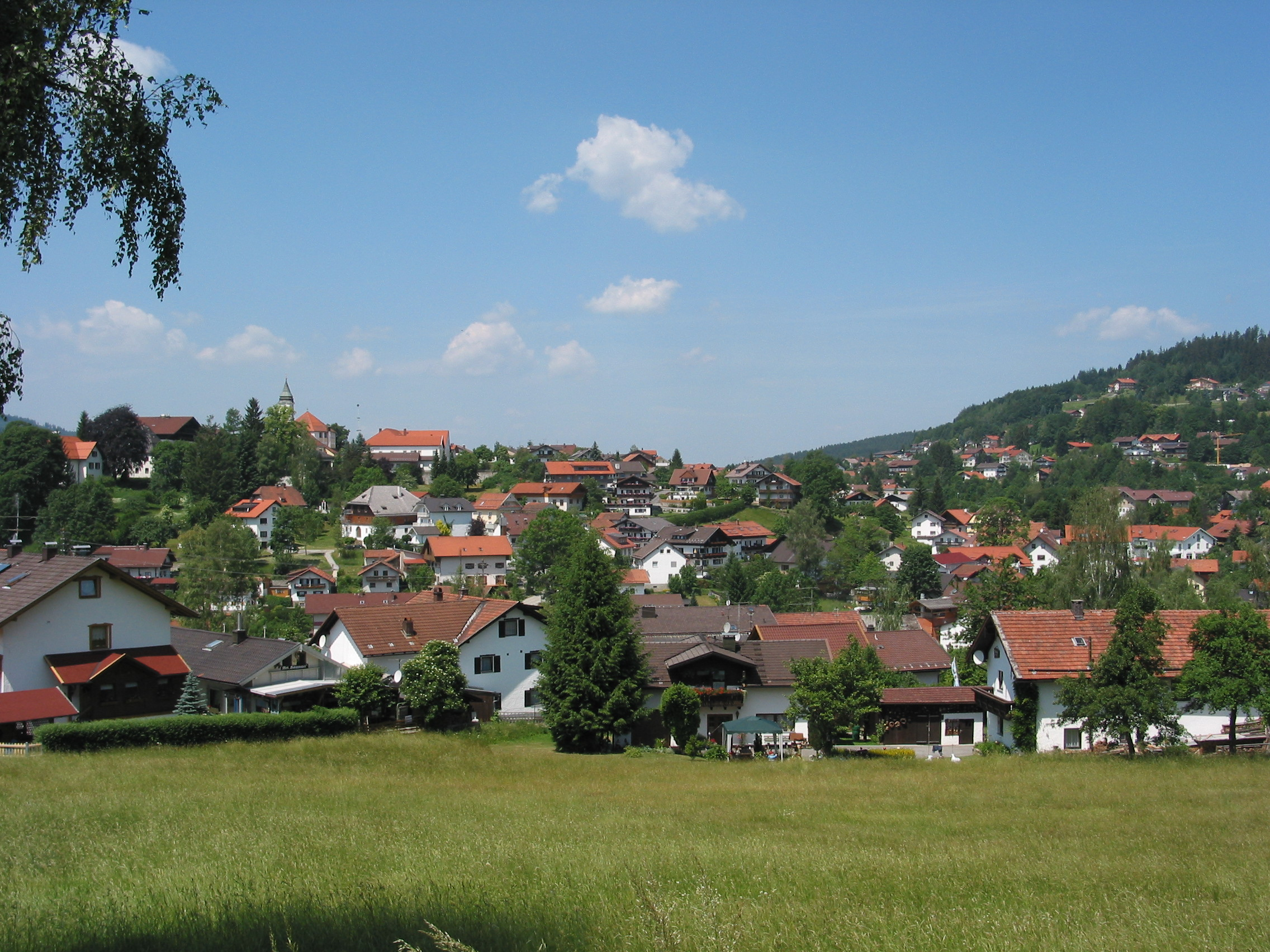 Blick auf Bodenmais